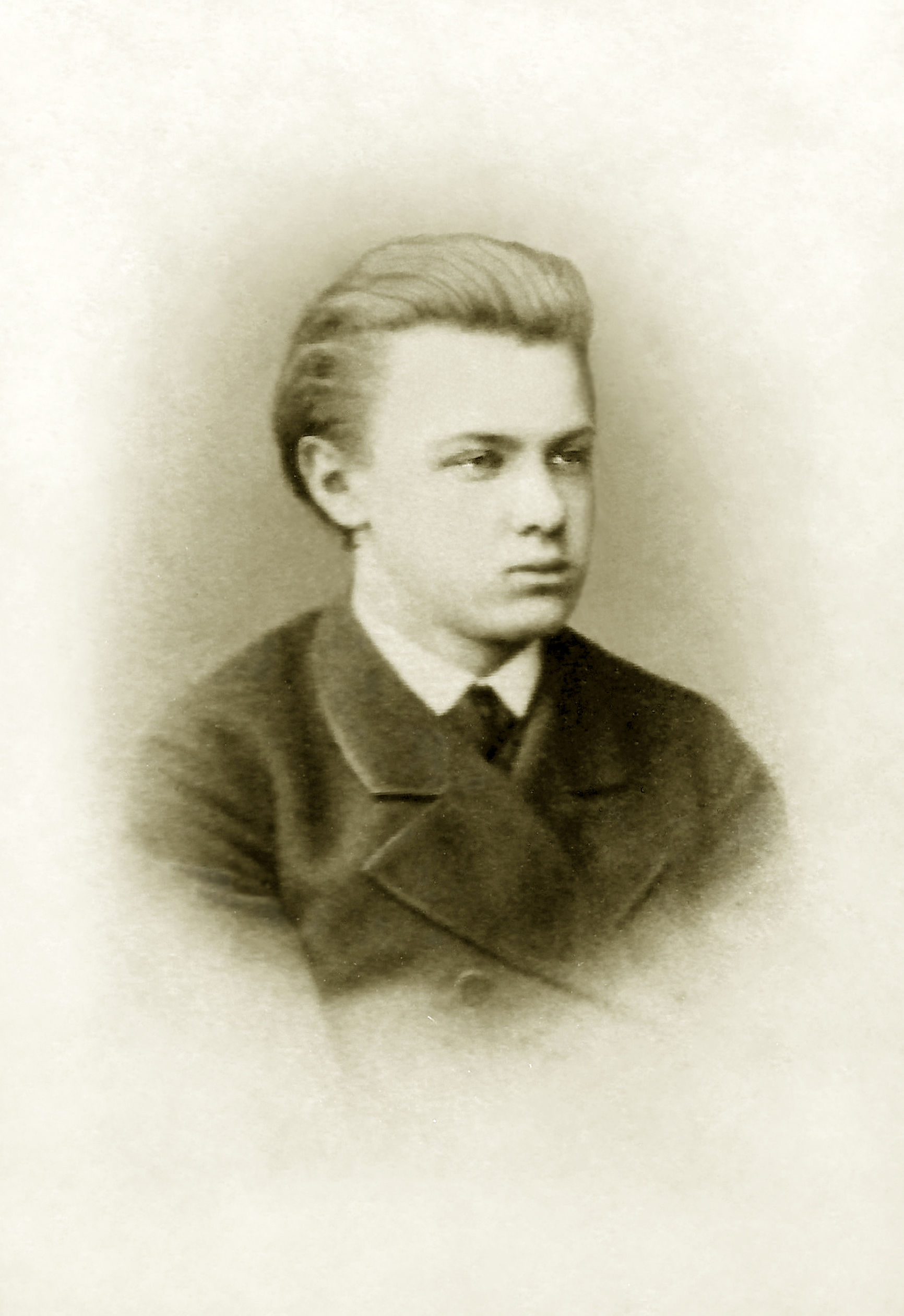 Профессор педиатрии ВМА Александр Николаевич Шкарин в годы учёбы в Императорской Медико-хирургической академии